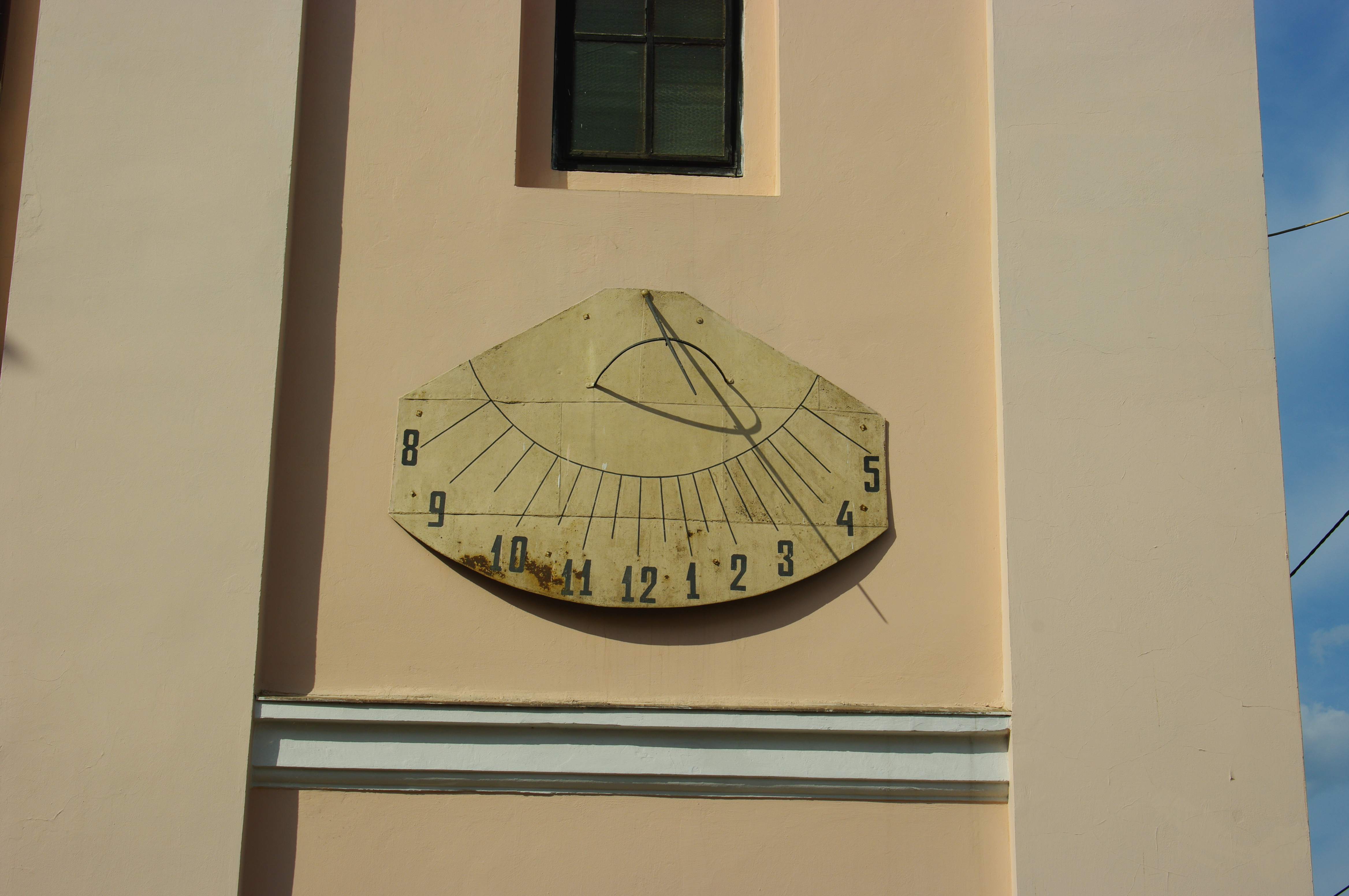 Римо-католицький костел "Святого хреста" (інж. Тенікорис), Чернівці, Головна, 20